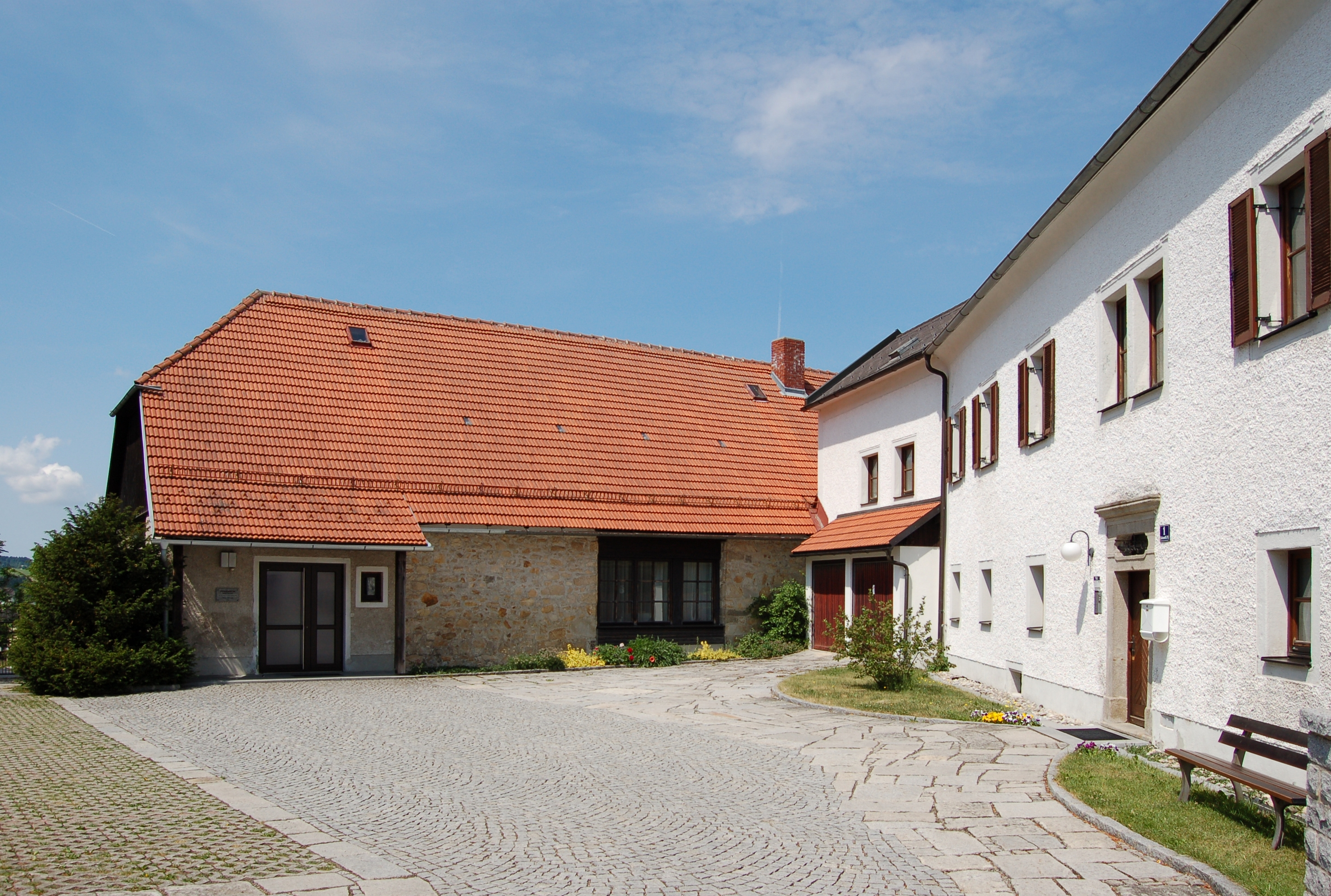 Der denkmalgeschützte Pfarrhof in Kleinzell im Mühlkreis, Oberösterreich. Der Pfarrhof der Kleinzeller Pfarrkirche wurde bereits 1434 urkundlich erwähnt, wobei das heutige Wohngebäude aus dem Ende des 17. Jahrhunderts und das Wirtschaftsgebäude aus der Mitte des 19. Jahrhunderts stammt. Der zweigeschoßige Bau mit Schopfwalmdach besitzt ein barockes Portal und Fenster mit Ohrenfaschenrahmung, das Wirtschaftsgebäude befindet sich hakenförmig angebaut.